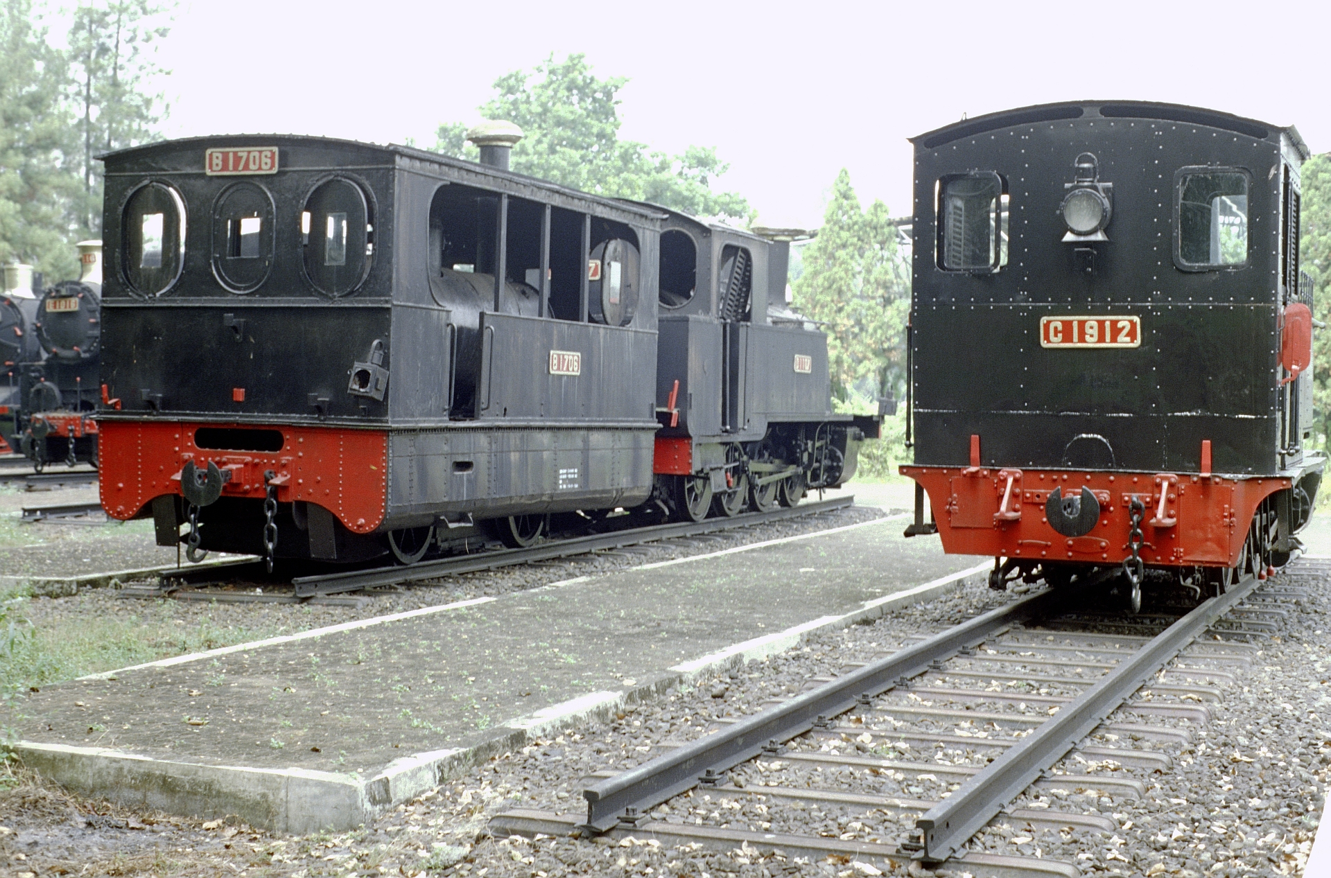 DKA B17 (A)